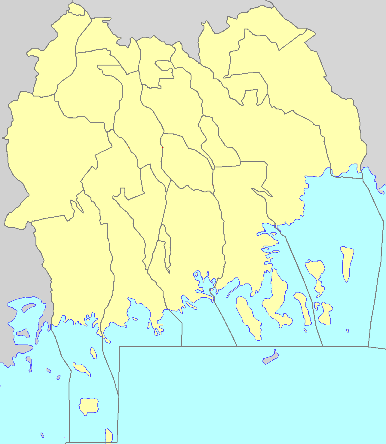 Схематична карта поселень у складі Камизяцького району Астраханської області Росії